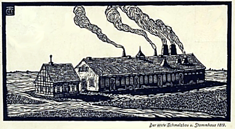 Stammhaus Krupp 1819